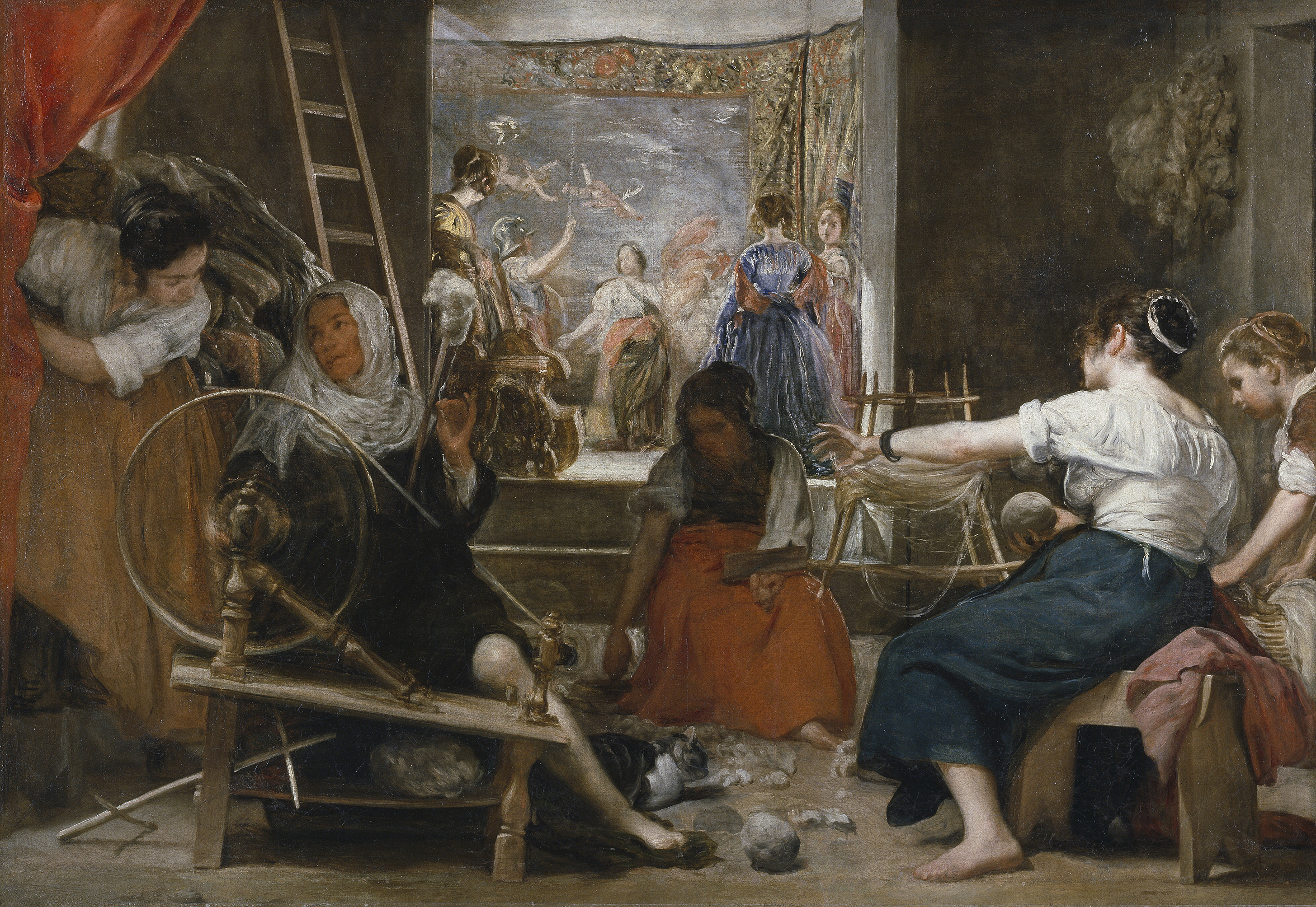 La obra representa el momento en que la tejedora Aracne fue convertida en araña por la diosa Atenea, y es una de las obras mitológicas más conocidas del pintor sevillano Diego Velázquez.